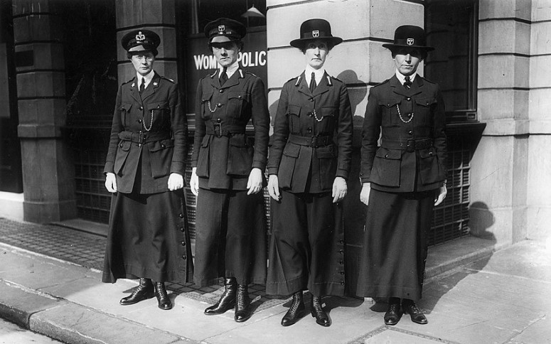 emakume poliziak